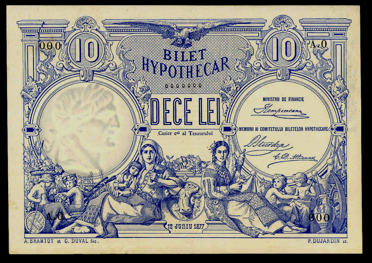 Bilet hypotecar de 10 lei.jpg